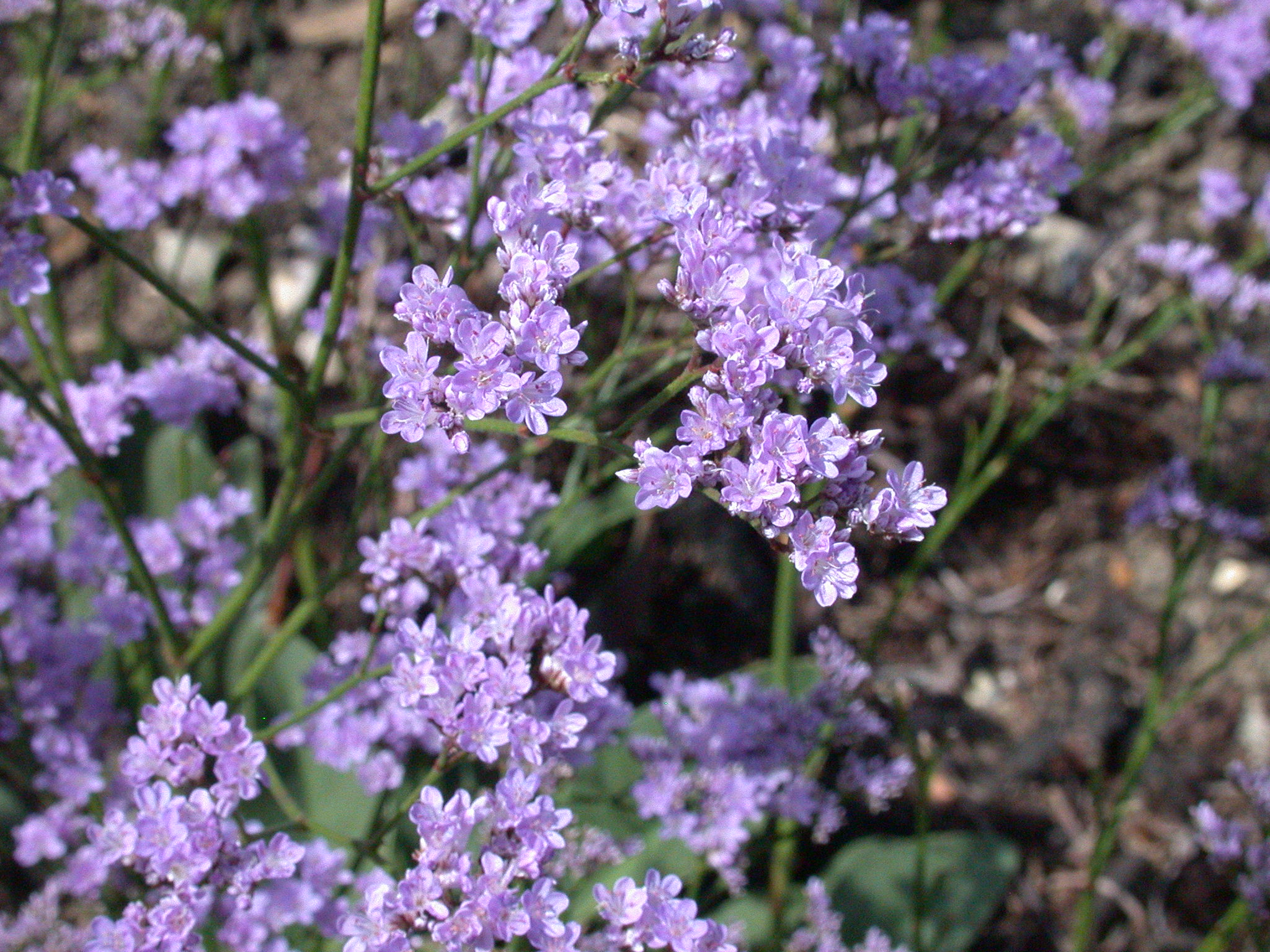 Specimen labelled: "Limonium humile. Plumbaginaceae. C Europe."